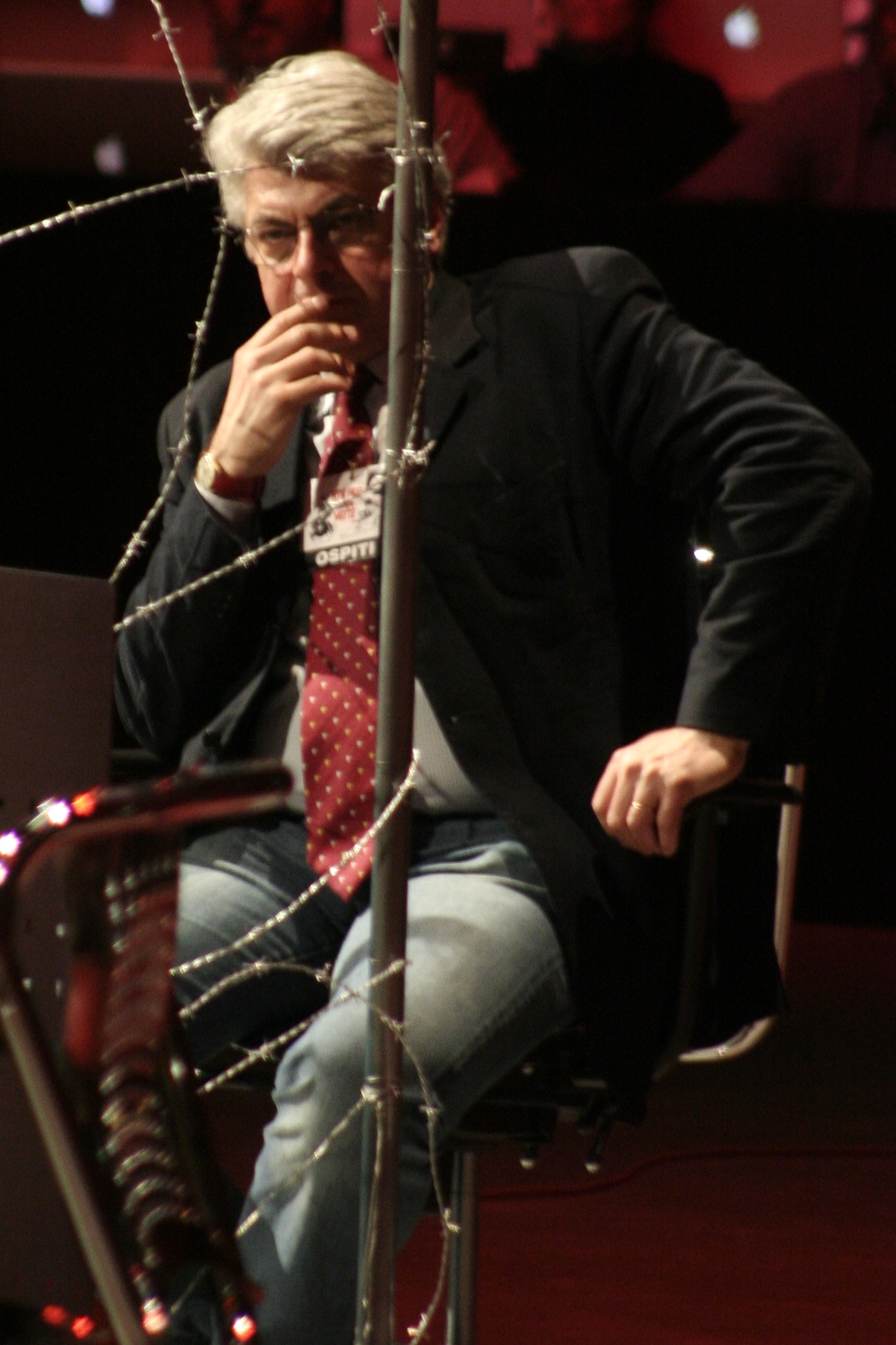 Loris Mazzetti a Rai per una notte. Speciale Anno Zero, contro la censura. Bologna.